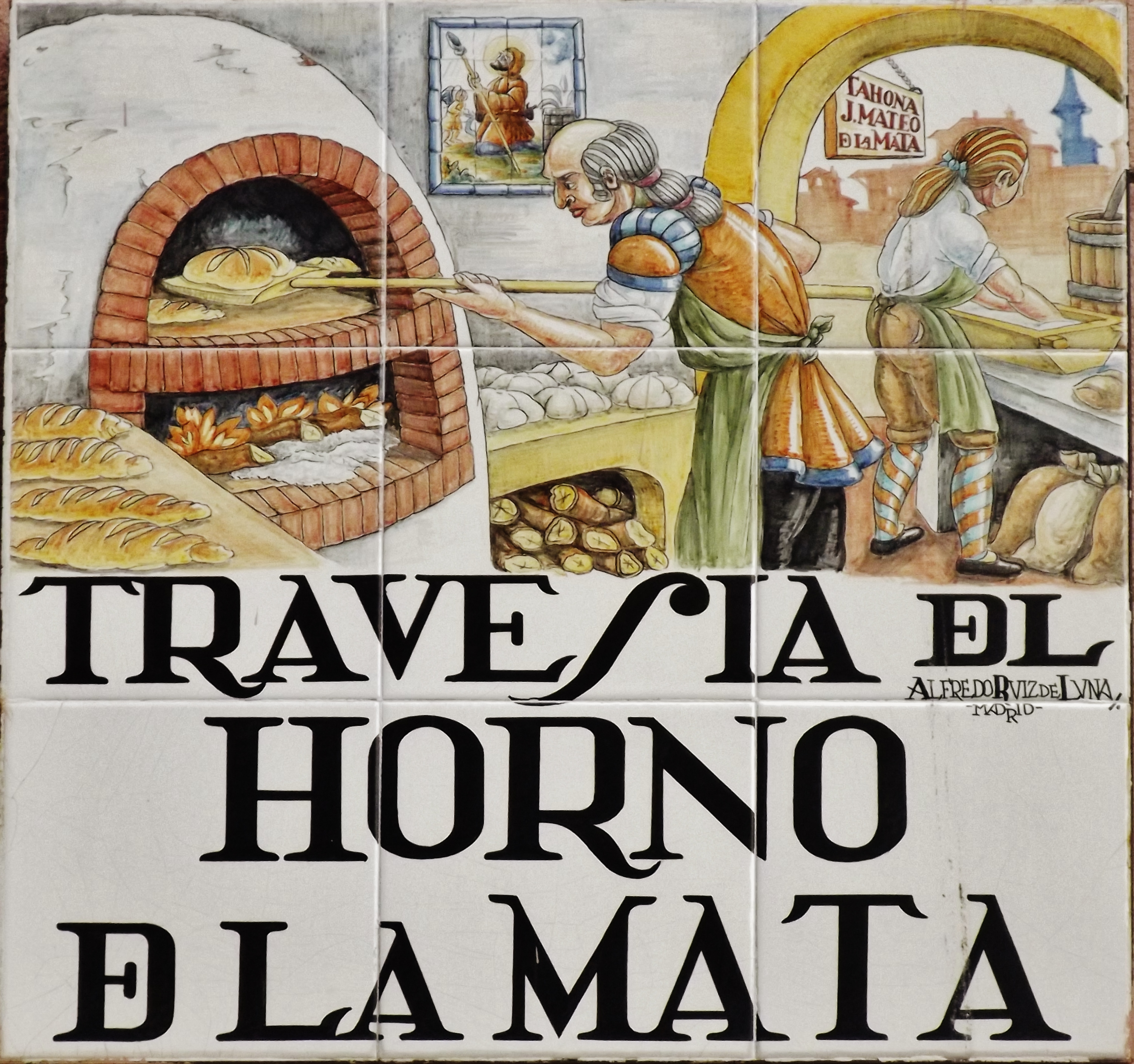 Placa de la Travesía del Horno de la Mata, de Alfredo Ruiz de Luna